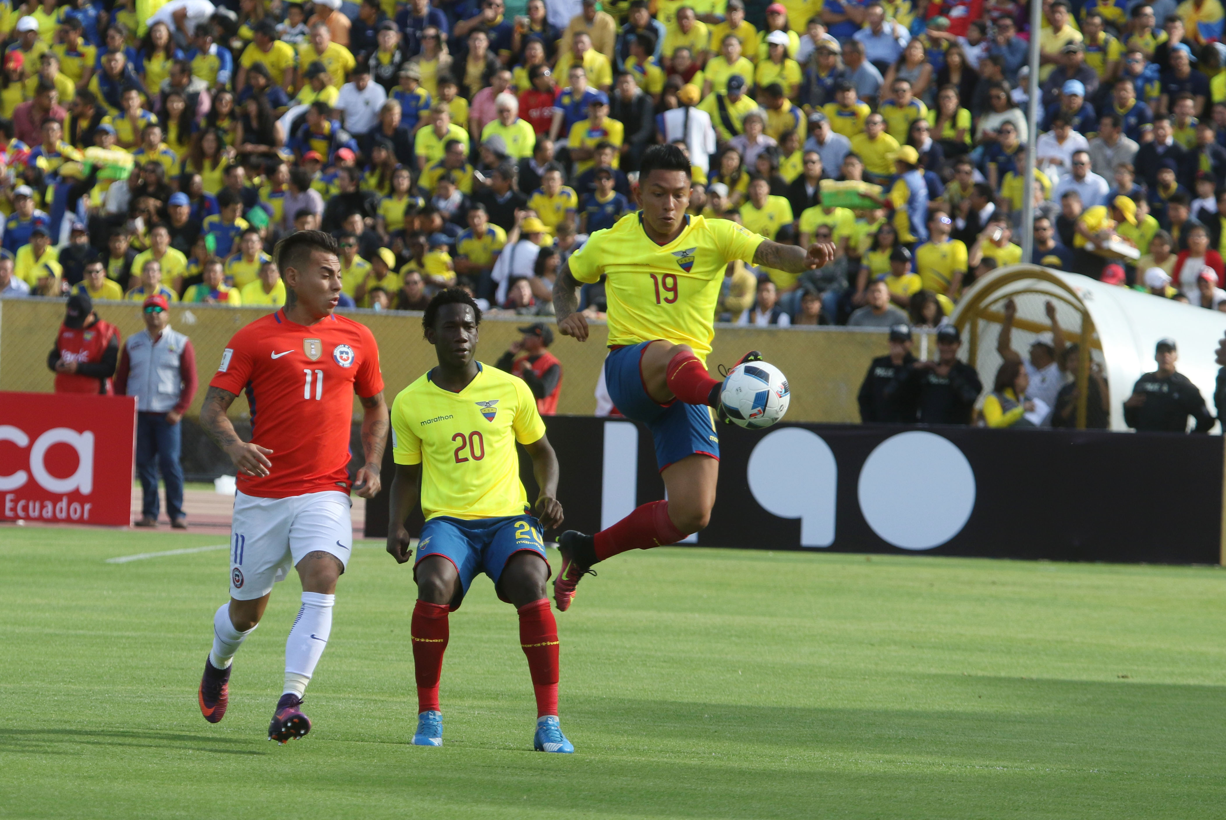 Quito, 6 oct (Andes).- Ecuador (amarillo) volvió a mostrar la imagen que lo llevó a ganar los primeros cuatro partidos en seguidilla de las Eliminatorias al Mundial Rusia 2018 y con algunas variantes se impuso por 3-0 a Chile en el estadio Olímpico Atahualpa de Quito.ANDES/Micaela Ayala V.